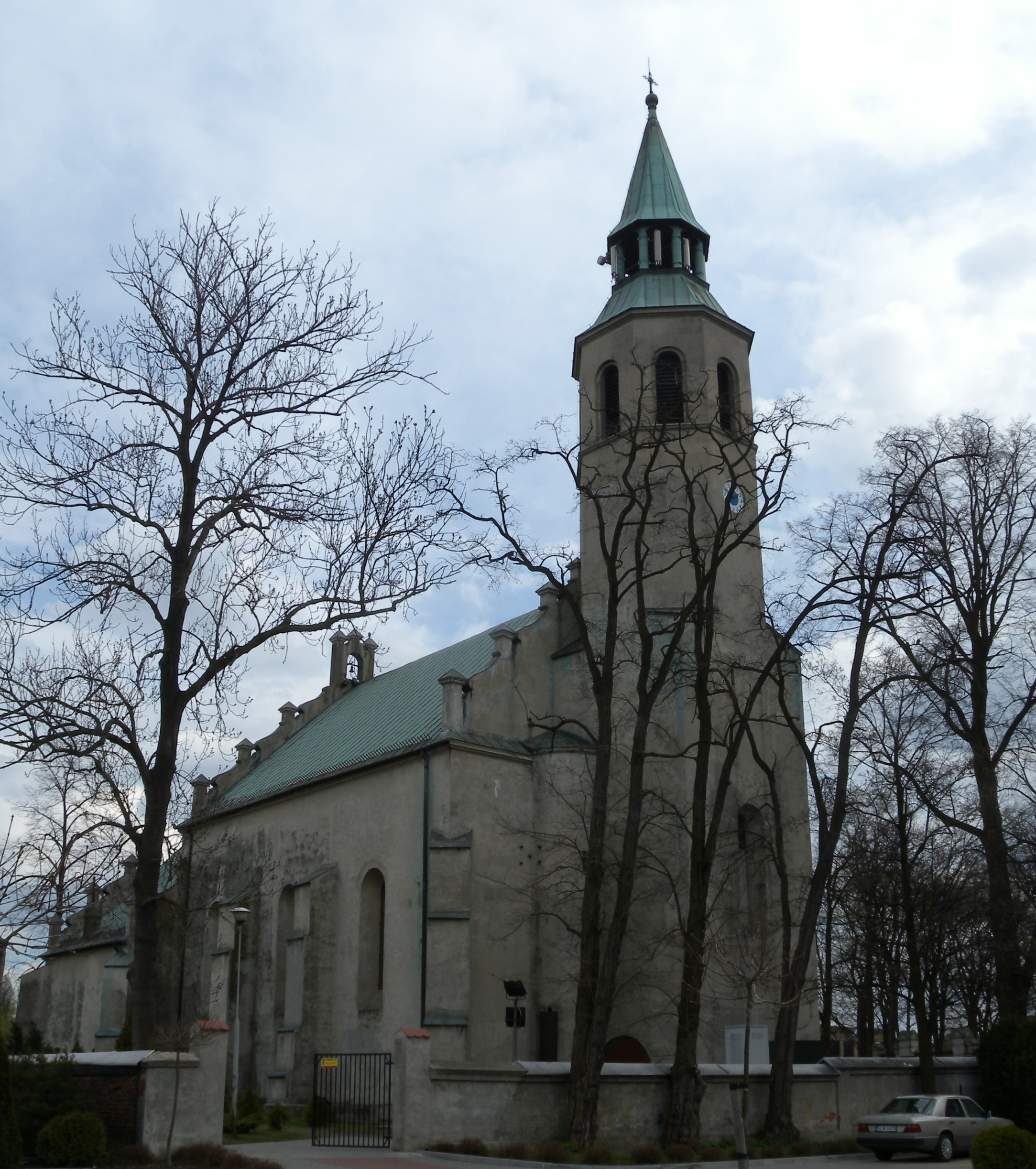 Kościół parafialny pw. św. Stanisława Biskupa